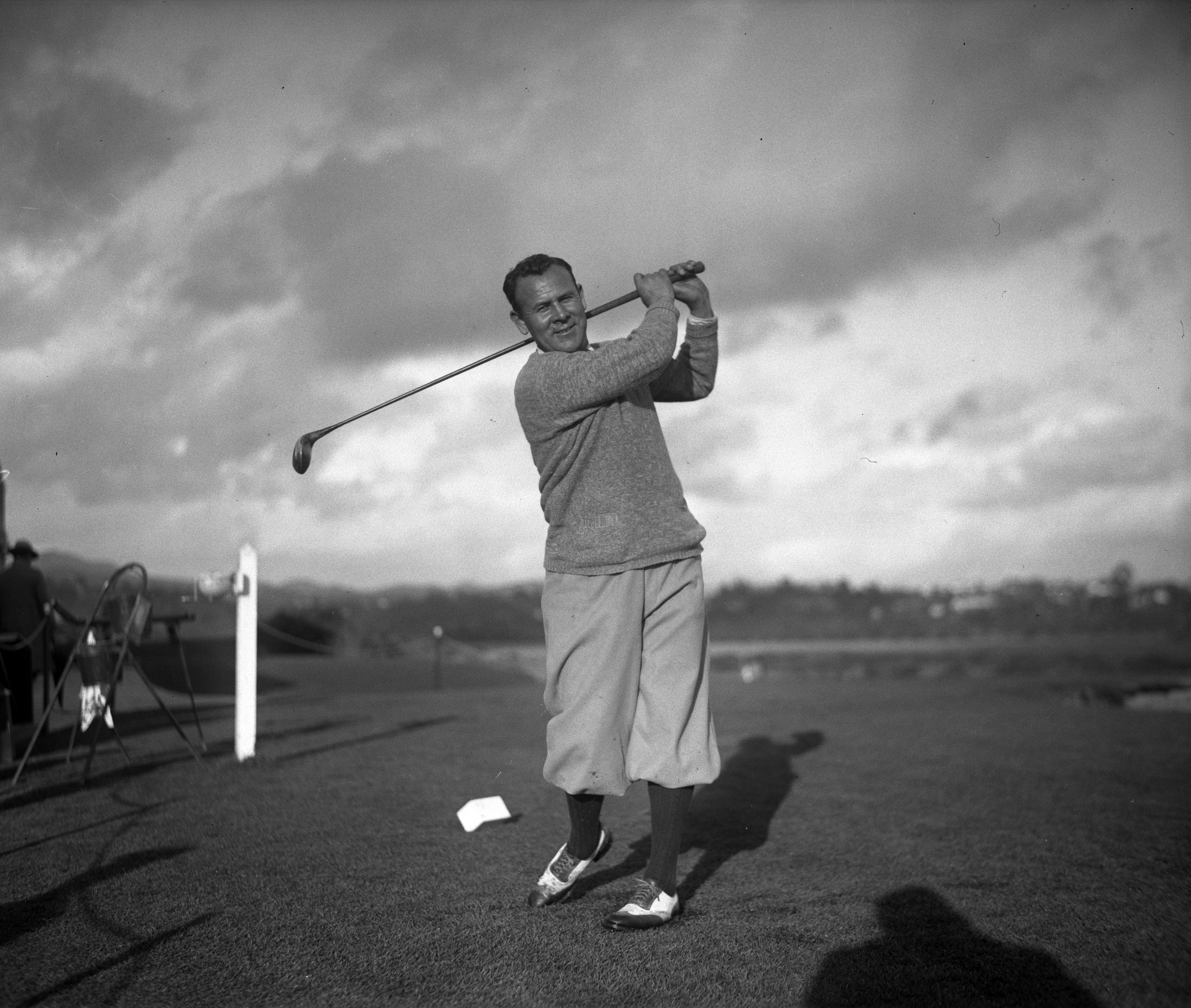 Golfer Al Espinoza posing, post-swing, circa 1920